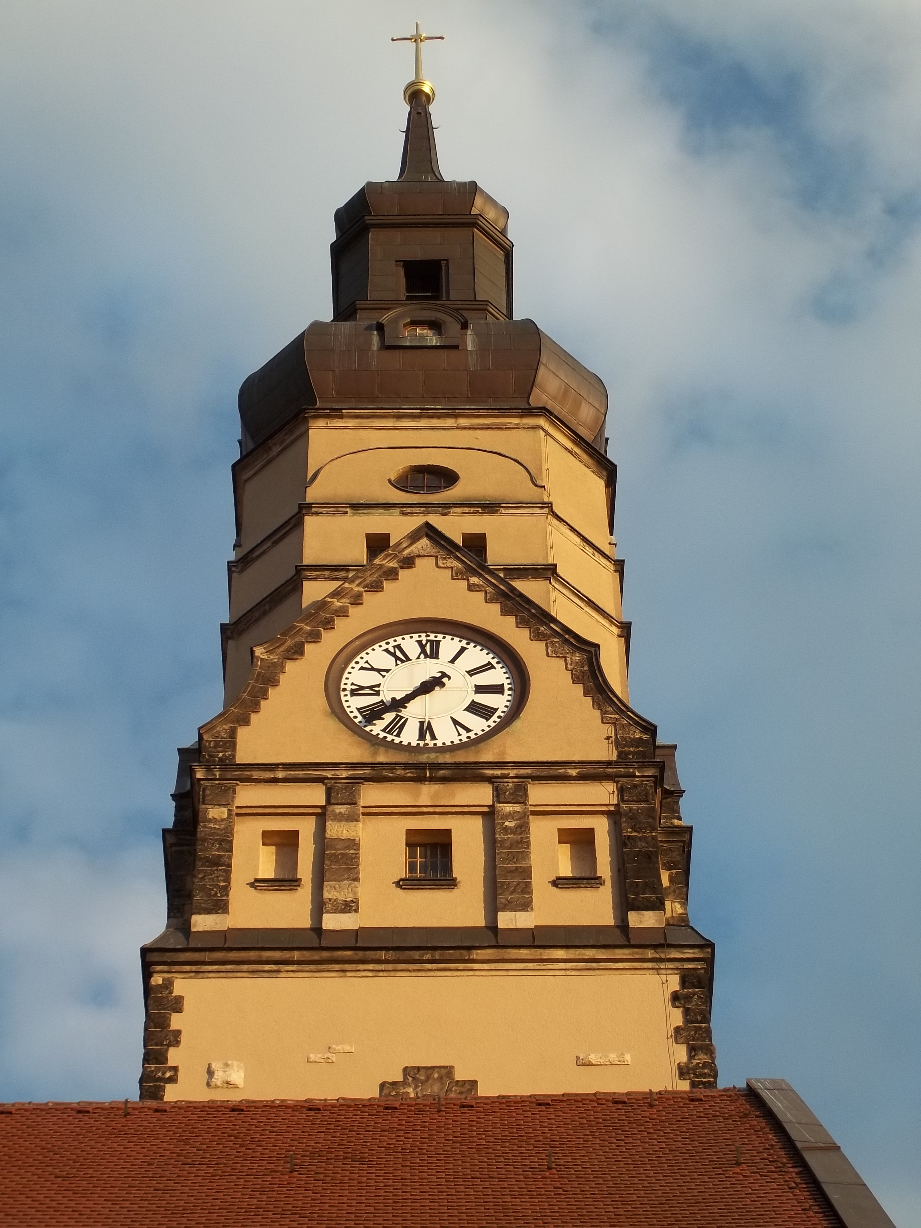 Der Kirchturm, Blick aus Richtung Gymnasium